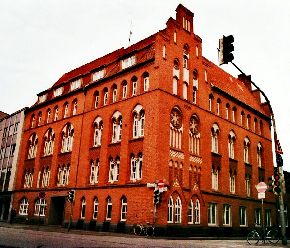 Das 1909 erbaute Unternehmensgebäude von Possehl und heutige Zentrale der Possehl-Stiftung This is a photograph of an architectural monument.It is on the list of cultural monuments of Lübeck